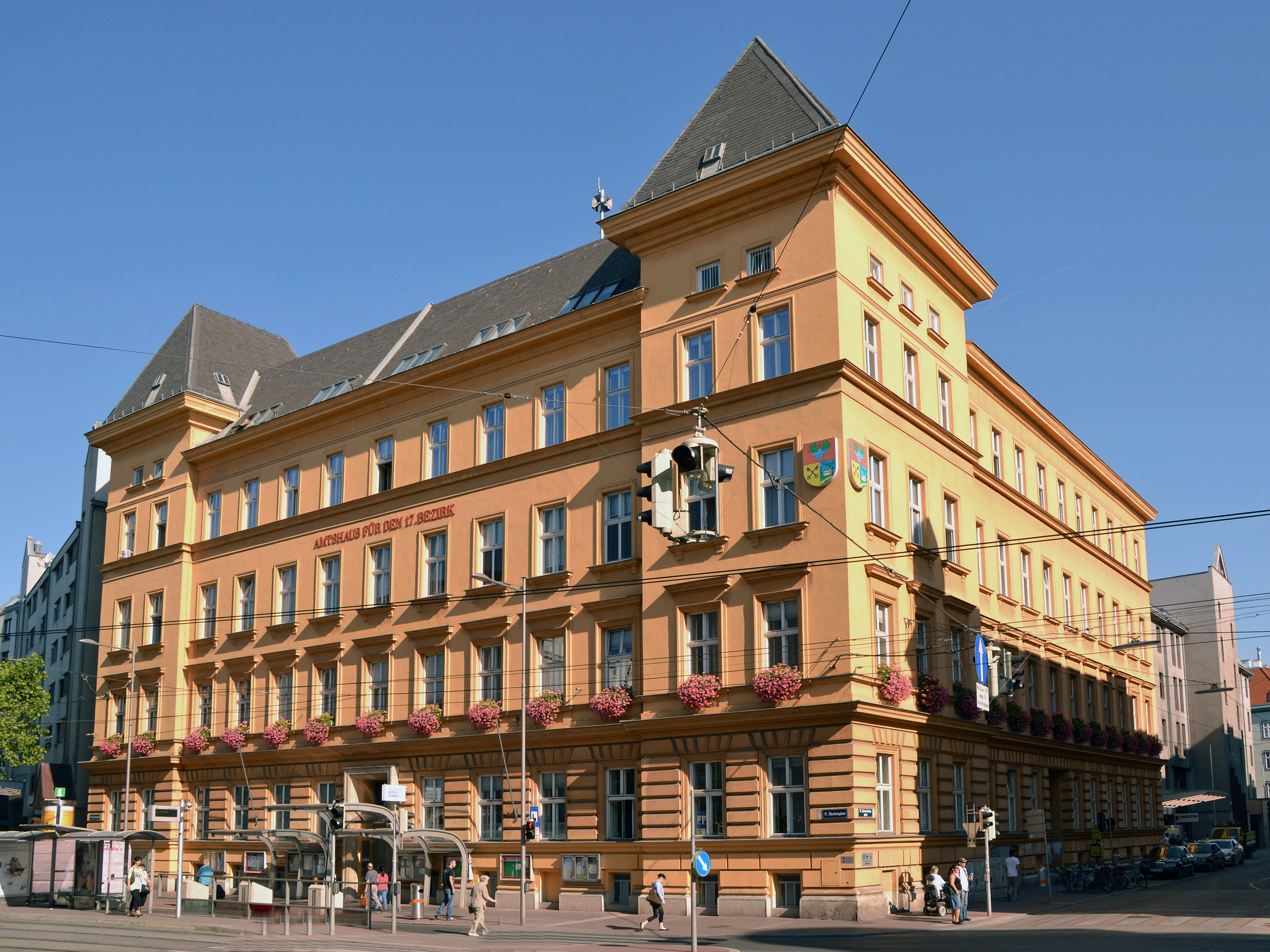 Amtshaus Hernals, Wien